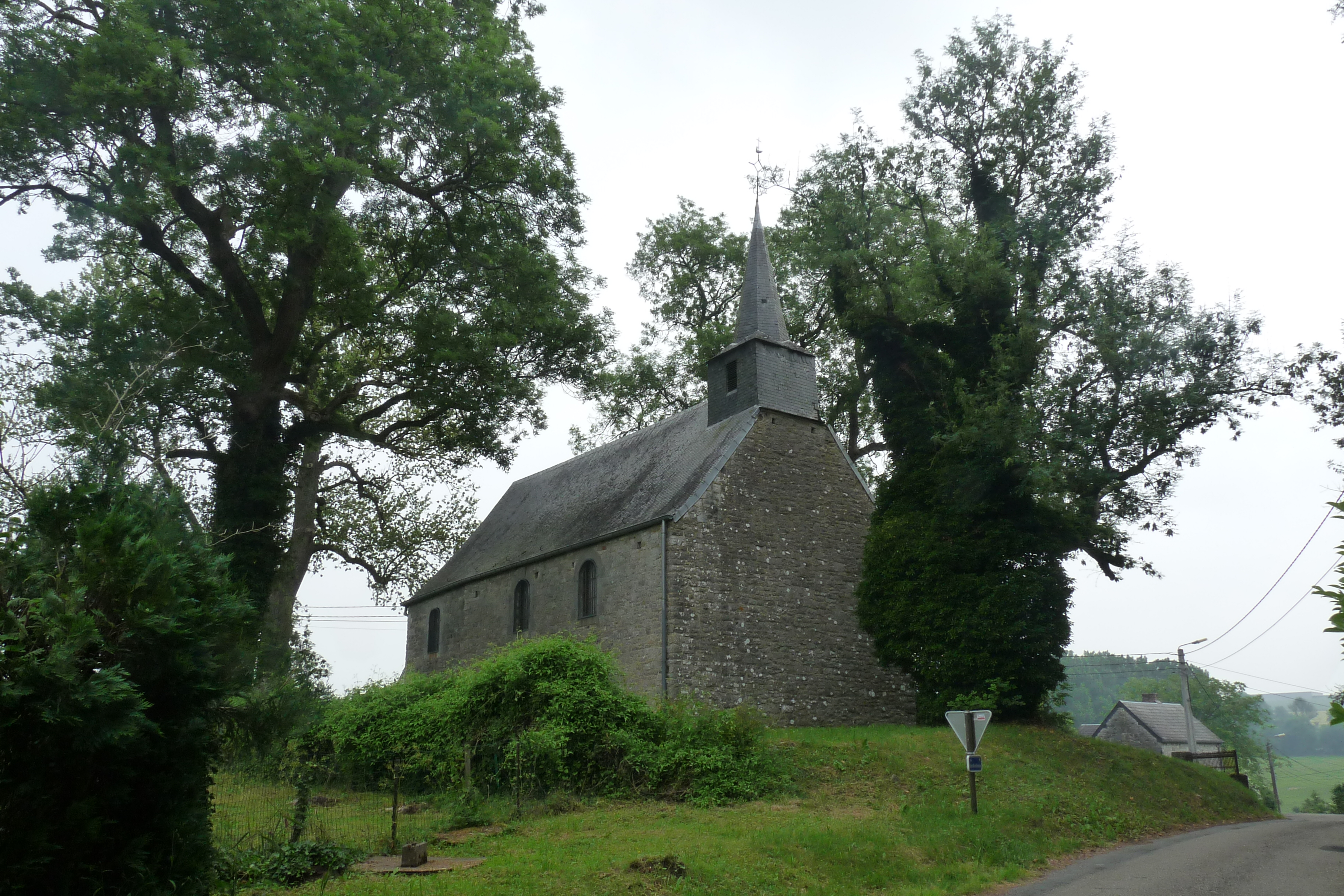 Ensemble classé au patrimoine historique de la Région Wallonne (code M3 et S1)